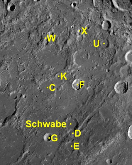 Cráter lunar Schwabe. Cráteres satélite. (Imagen LRO)